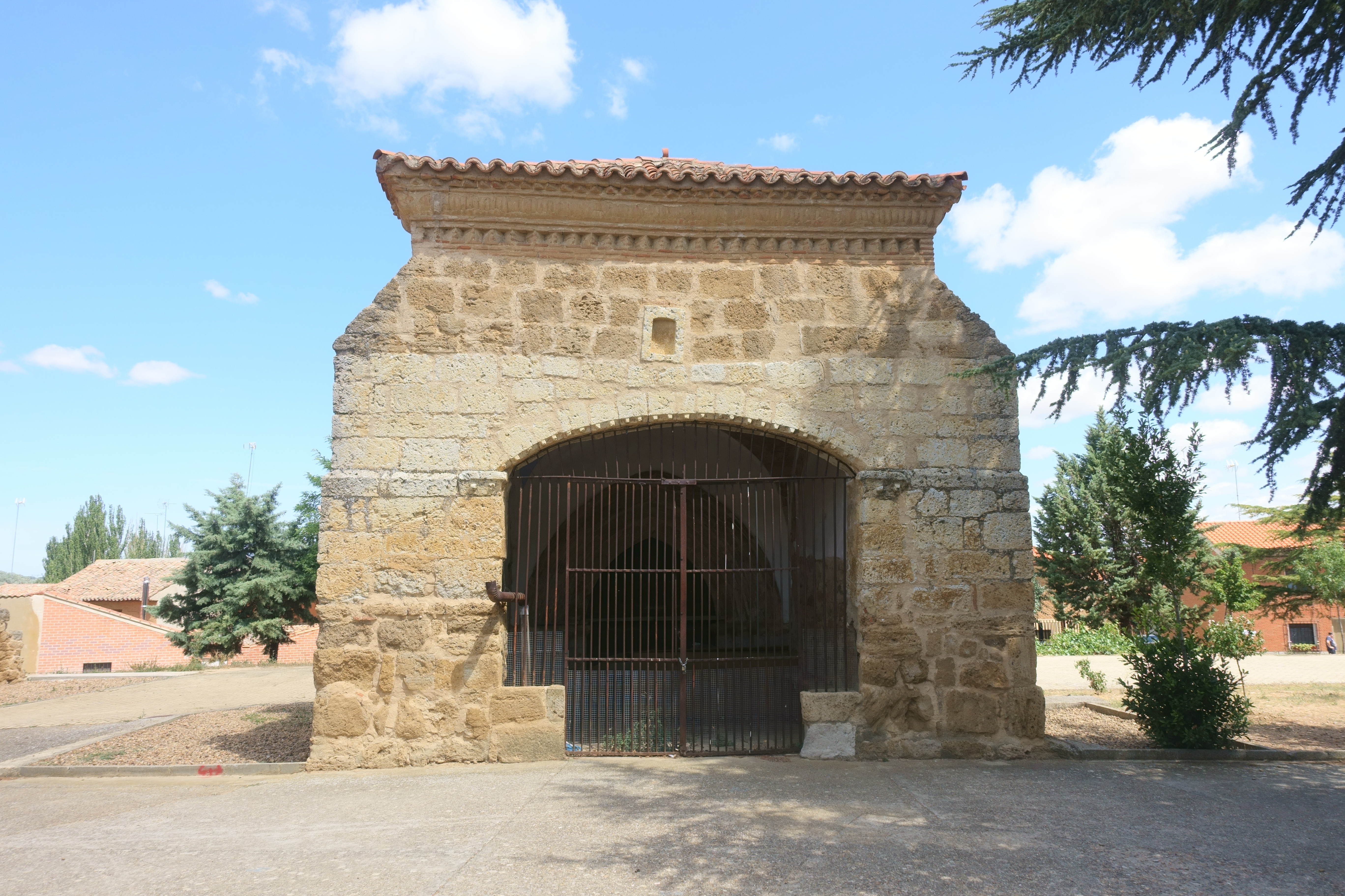 Restos de la iglesia de Santa María de la Sagrada, Castroverde de Campos (Zamora, España).